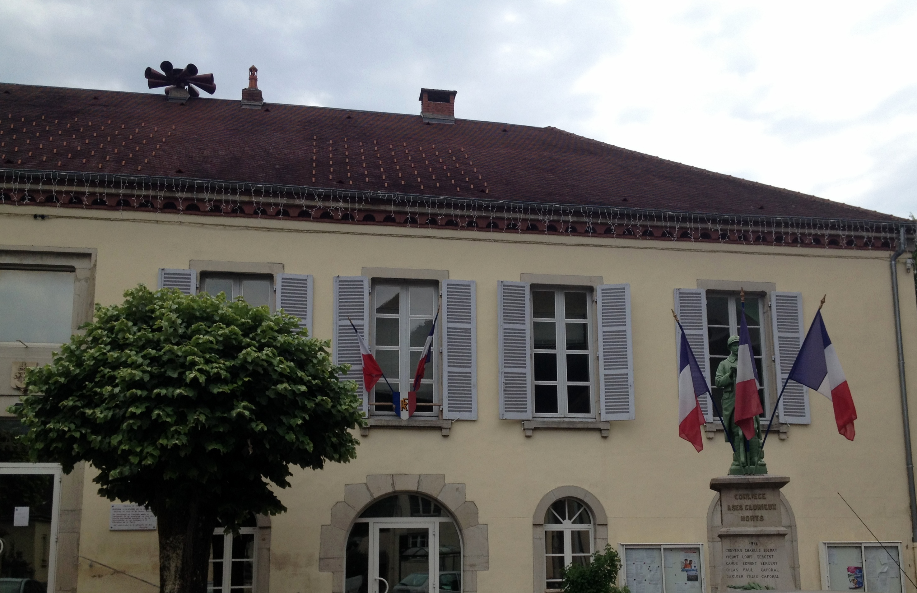 Mairie de Conliège.